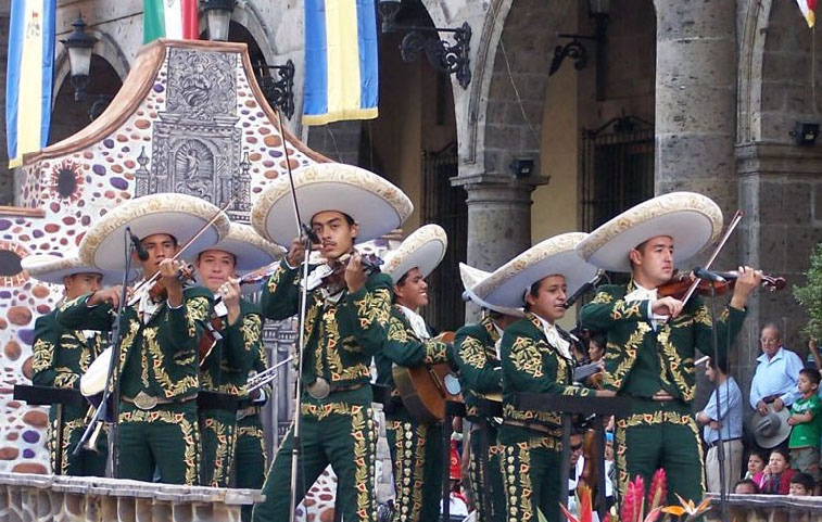 A mariachi band at the XIII Encuentro Internacional del Mariachi y la Charreria, Guadalajara, Mexico.